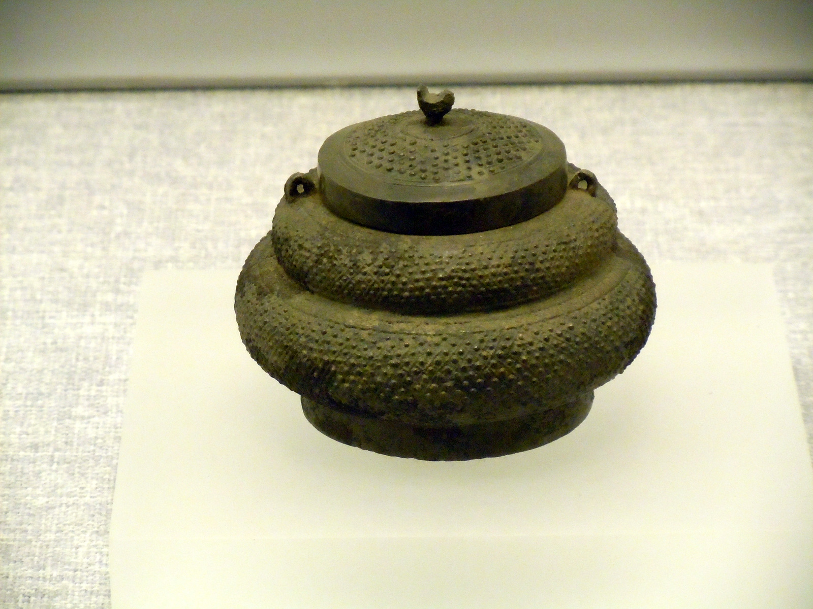 中文（中国大陆）: 出土于河南省固始县侯古堆一号墓的乳钉纹圆铜盒